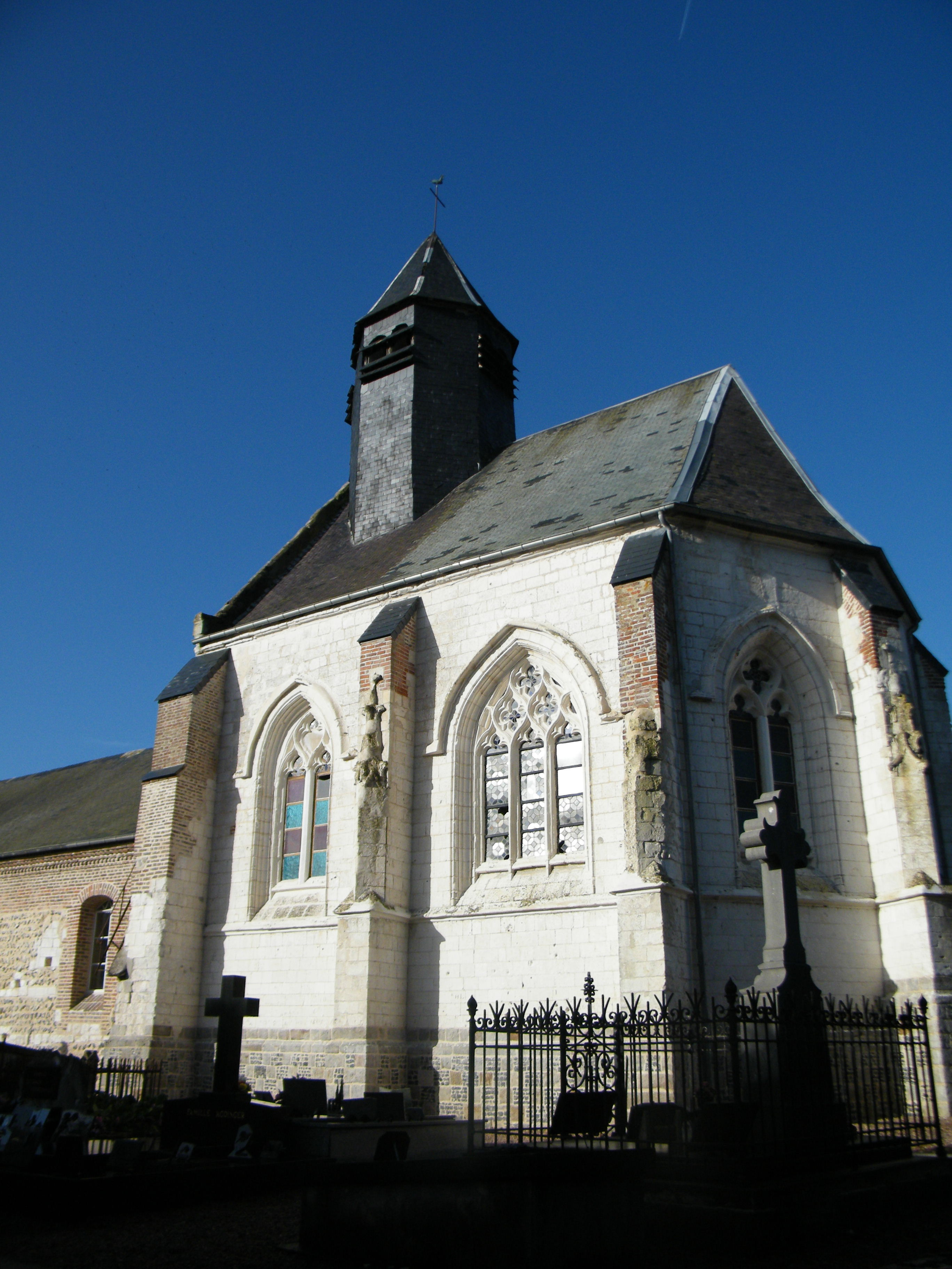 L'église.